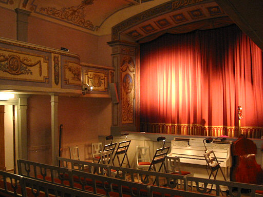 Stadttheater Weißenhorn, Germany Auditorium (Zuschauerraum)